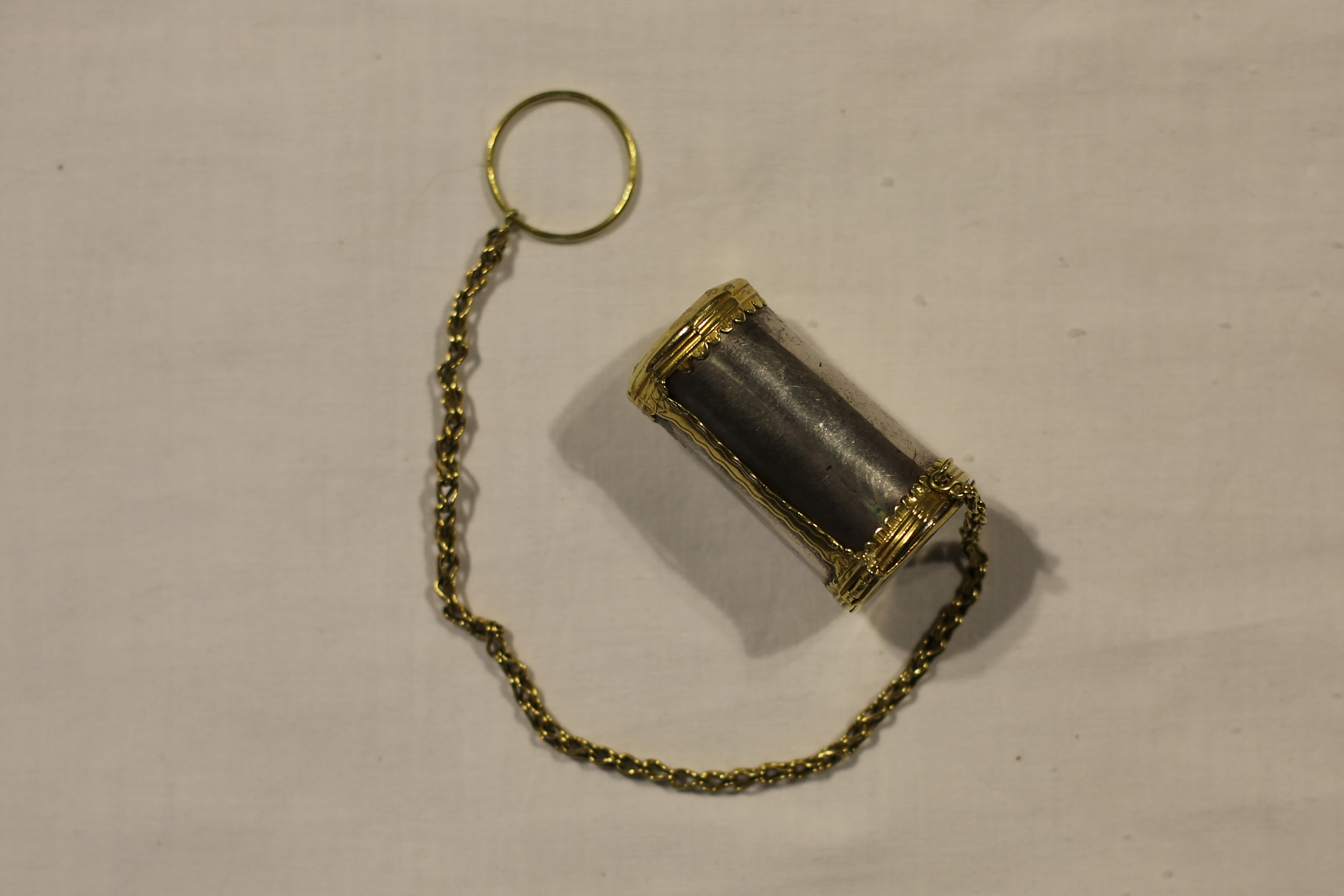 Reliquaire du doigt de saint Jean Baptiste, conservé dans le trésor de Saint-Jean-du-Doigt